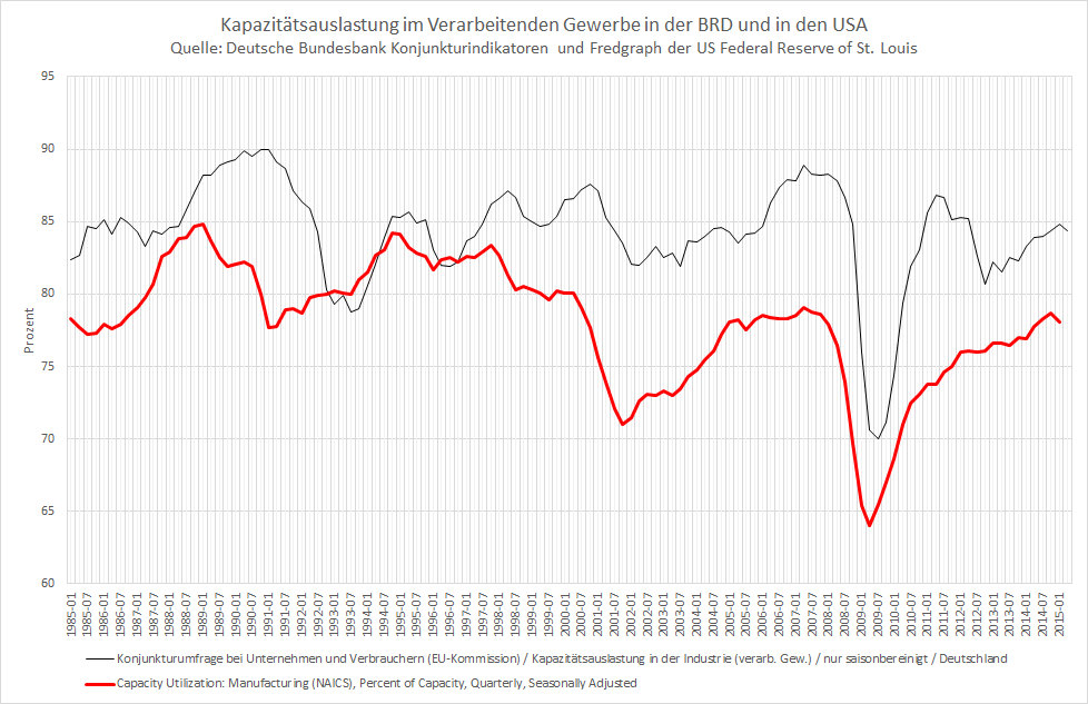 Kapazitätsauslastung in BRD und USA nach Daten der Deutschen Bundesbank und von Fredgraph St. Louis